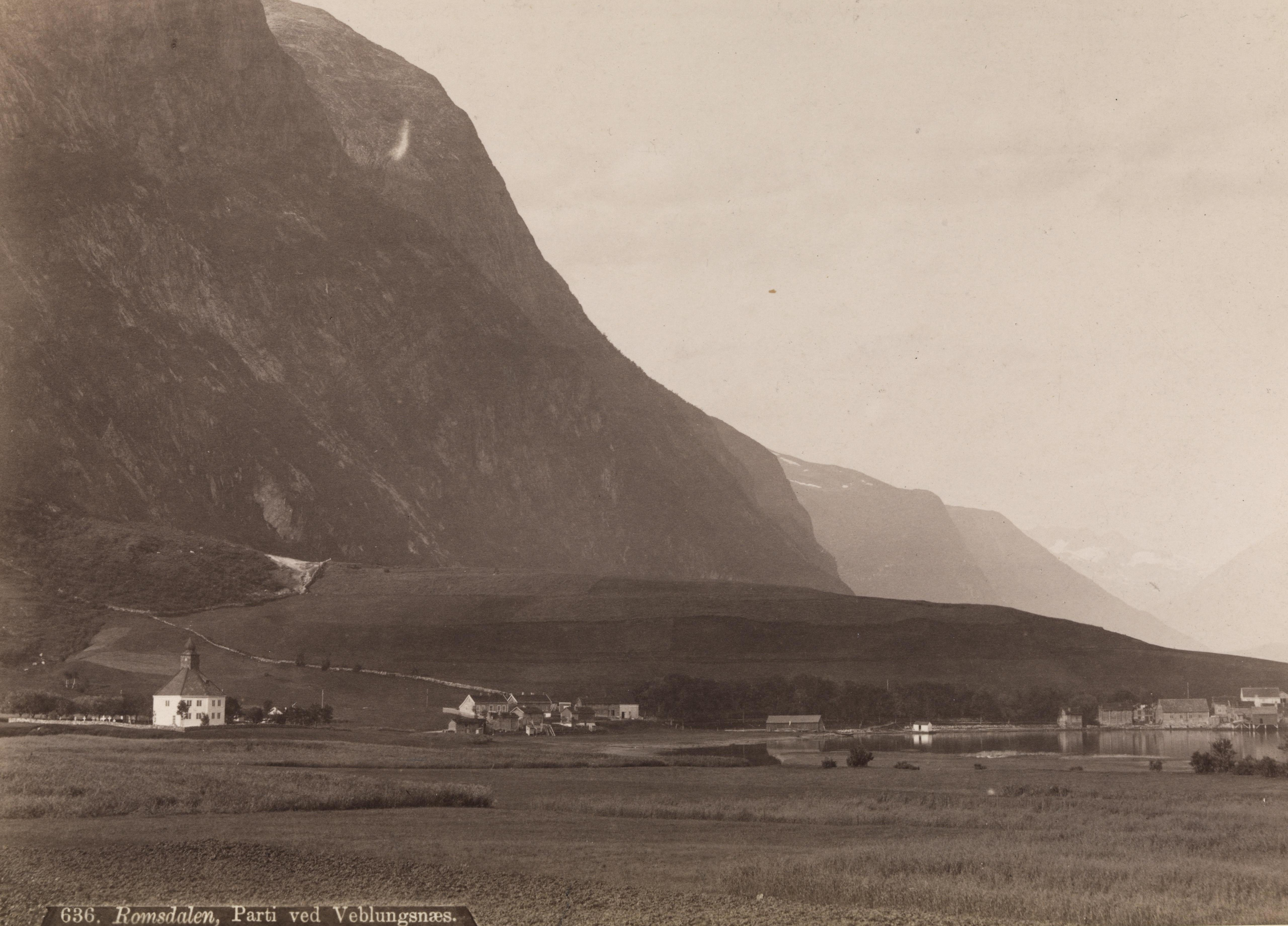 Bildet er hentet fra Nasjonalbibliotekets bildesamling Veblungsnes, Rauma, Møre og Romsdal